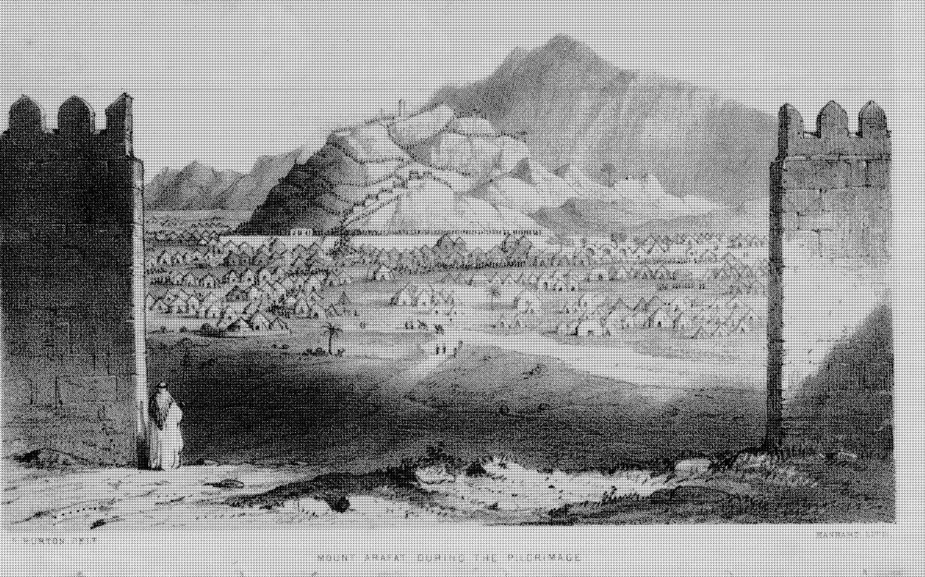 Illustration